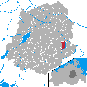 Burow, Landkreis Demmin, Mecklenburg-Vorpommern